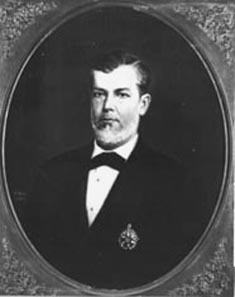 Obra da coleção Brasiliana Iconográfica.